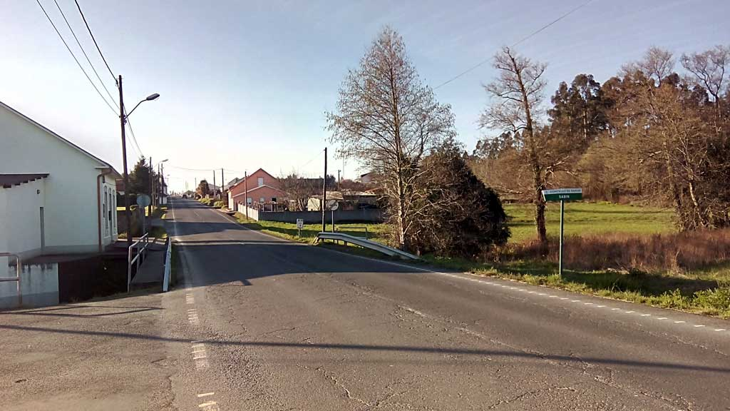 Vista de Sabín en Sedes, Narón.